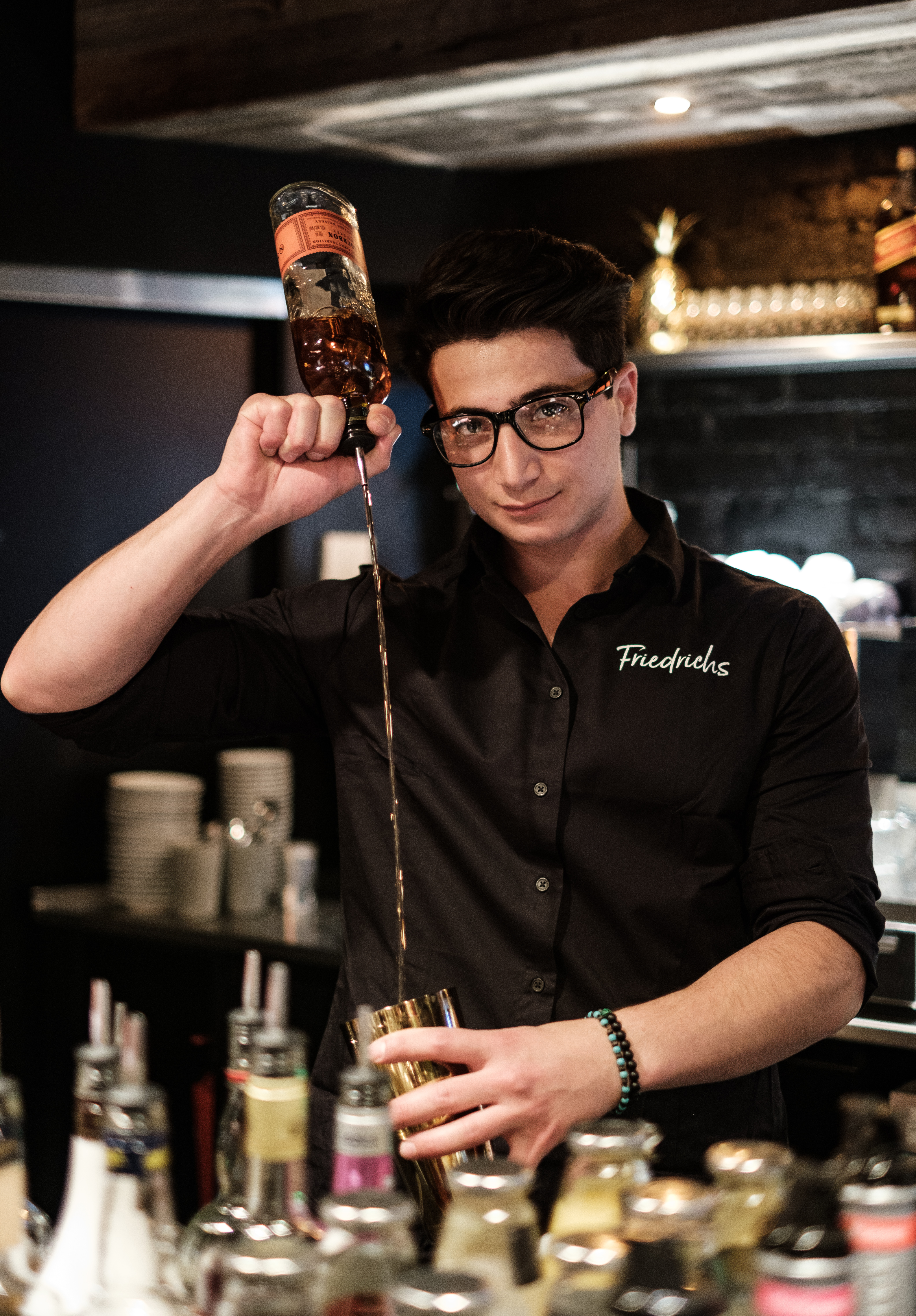 Barkeeper im Friedrichs in Tübingen bereitet einen Drink zu